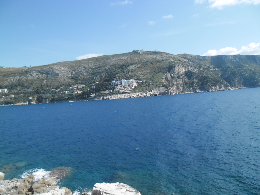 pogled s Lokruma na razrušeni hotel Belvedere